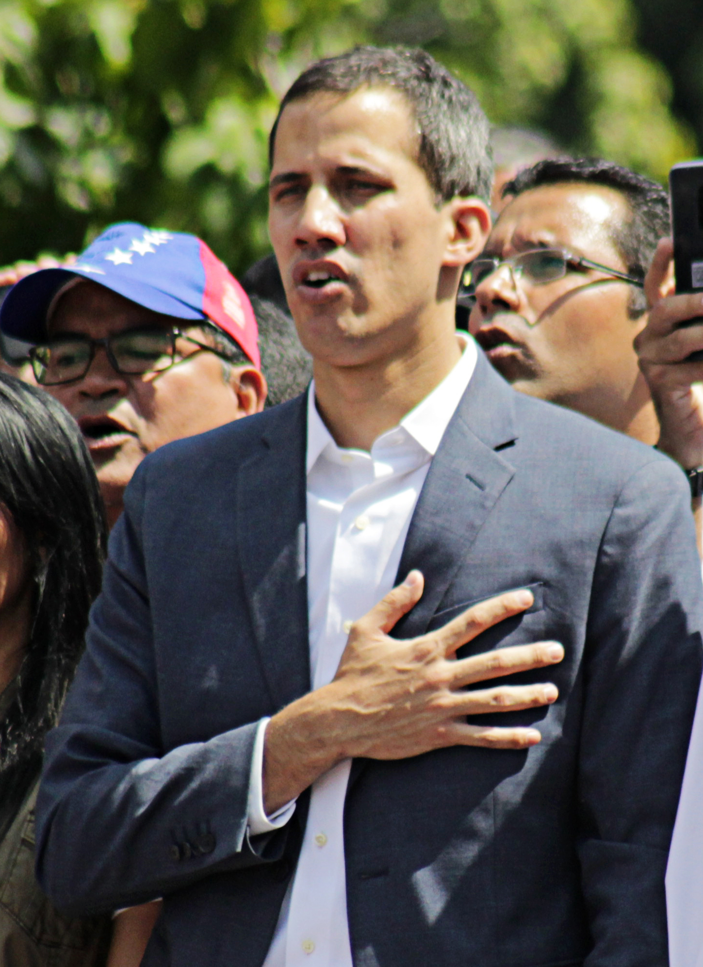 Marcha de protesta contra Maduro el 02 de Febrero del 2019 en Caracas convocada por Juan Guaido Presidente Interino de Venezuela. Realizada por Alex abello Leiva, conocido en el medio artístico como alexcocopro, fotógrafo, filmmaker deportista extremo, motivador, emprendedor, artista gráfico y lider de proyectos digitales.